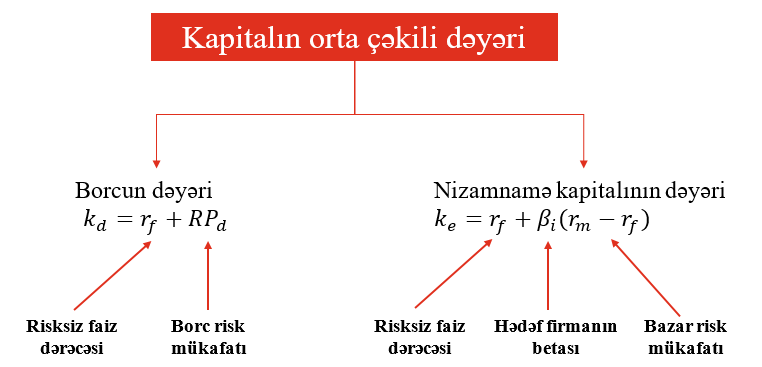 Kapitalın orta çəkili dəyəri